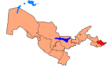 Uzbekistan - Andijan Province